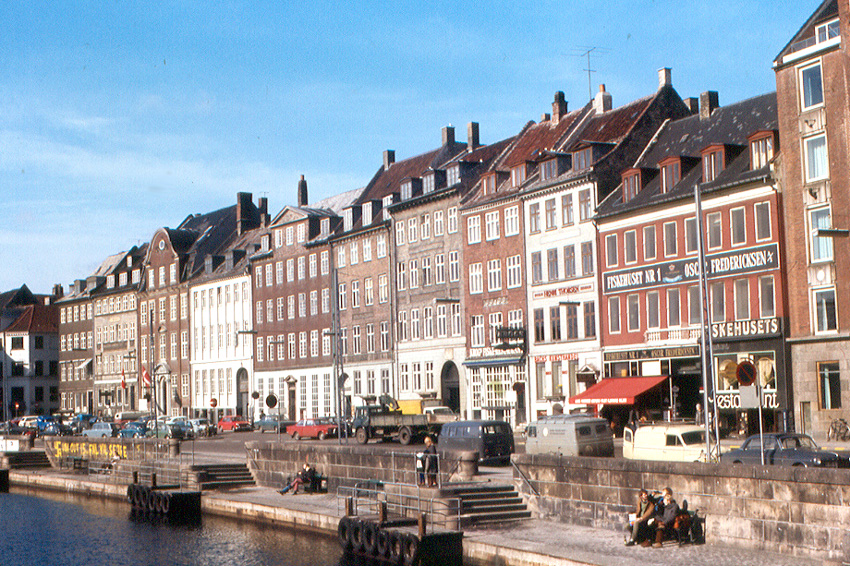 Gammel Strand, Copenhagen